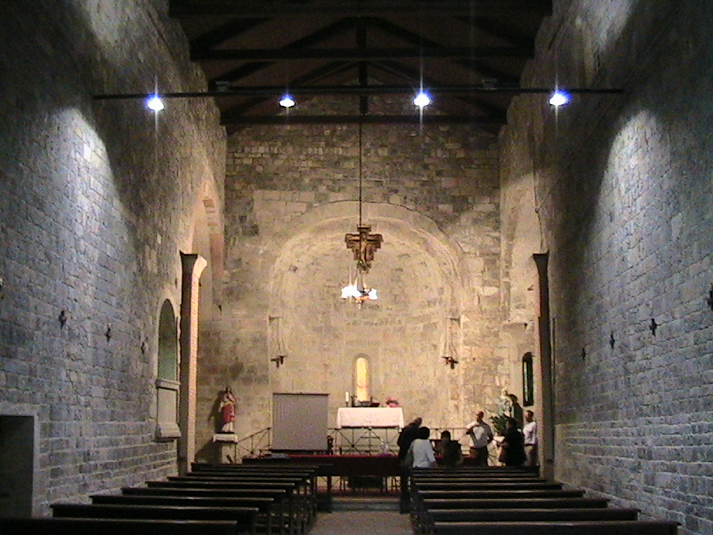 La Badia Cavana (San Basilide) a San Michele Cavana - abside